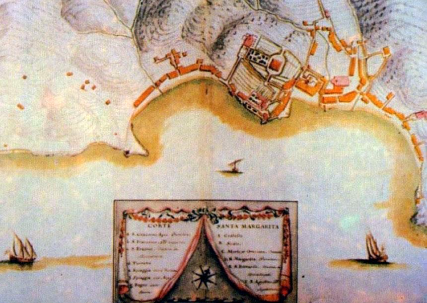 Mappa del cartografo Matteo Vinzoni raffigurante i due borghi di Corte e Santa Margherita nel 1767, Santa Margherita Ligure, Liguria, Italia